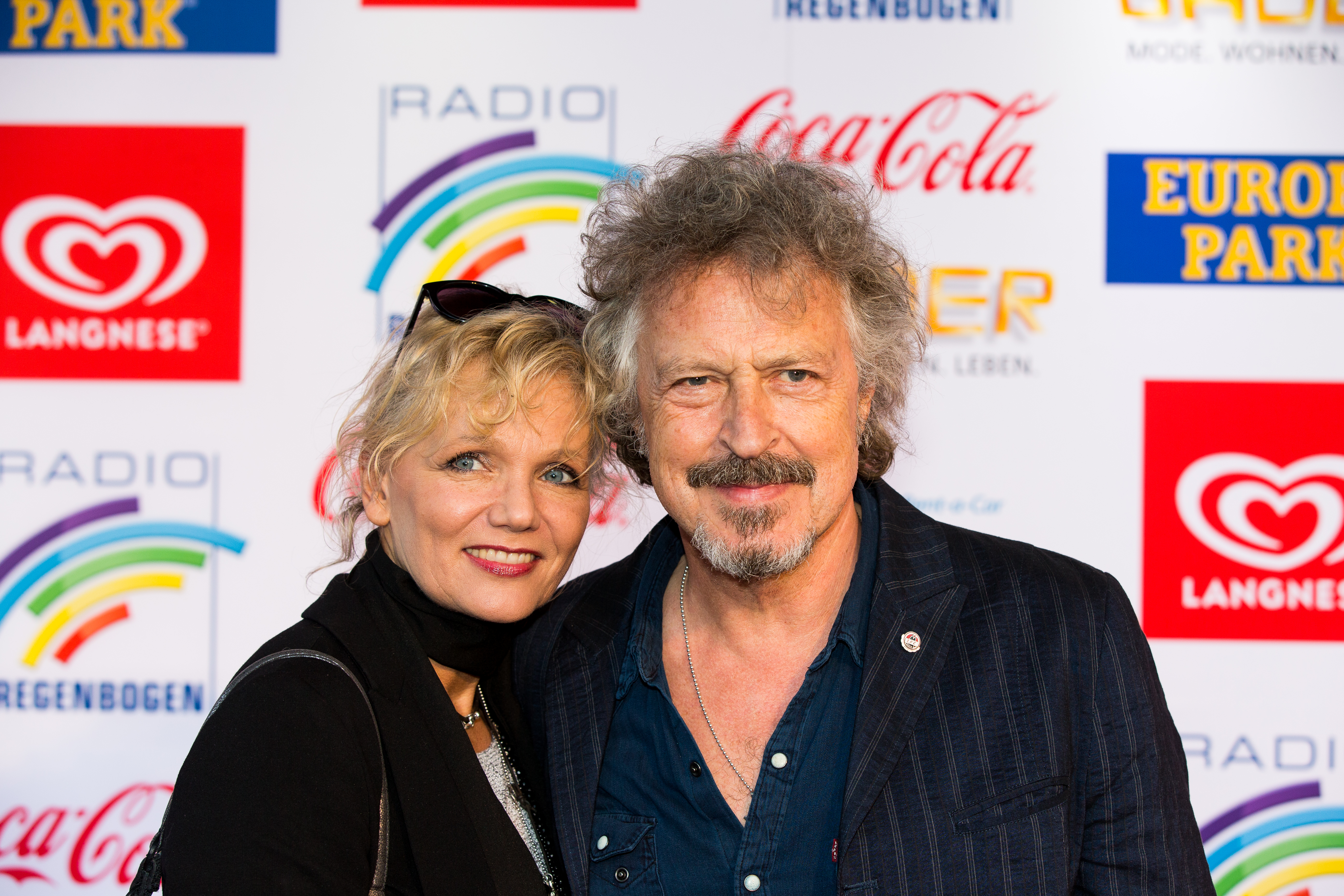 during Radio Regenbogen Award 2017 at Europapark, Rust, Baden-Württemberg, Germany on 2017-04-07, Photo: Sven Mandel